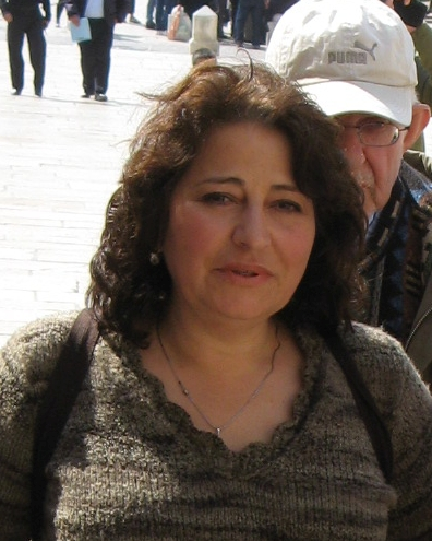 Faten Mukarker 2012